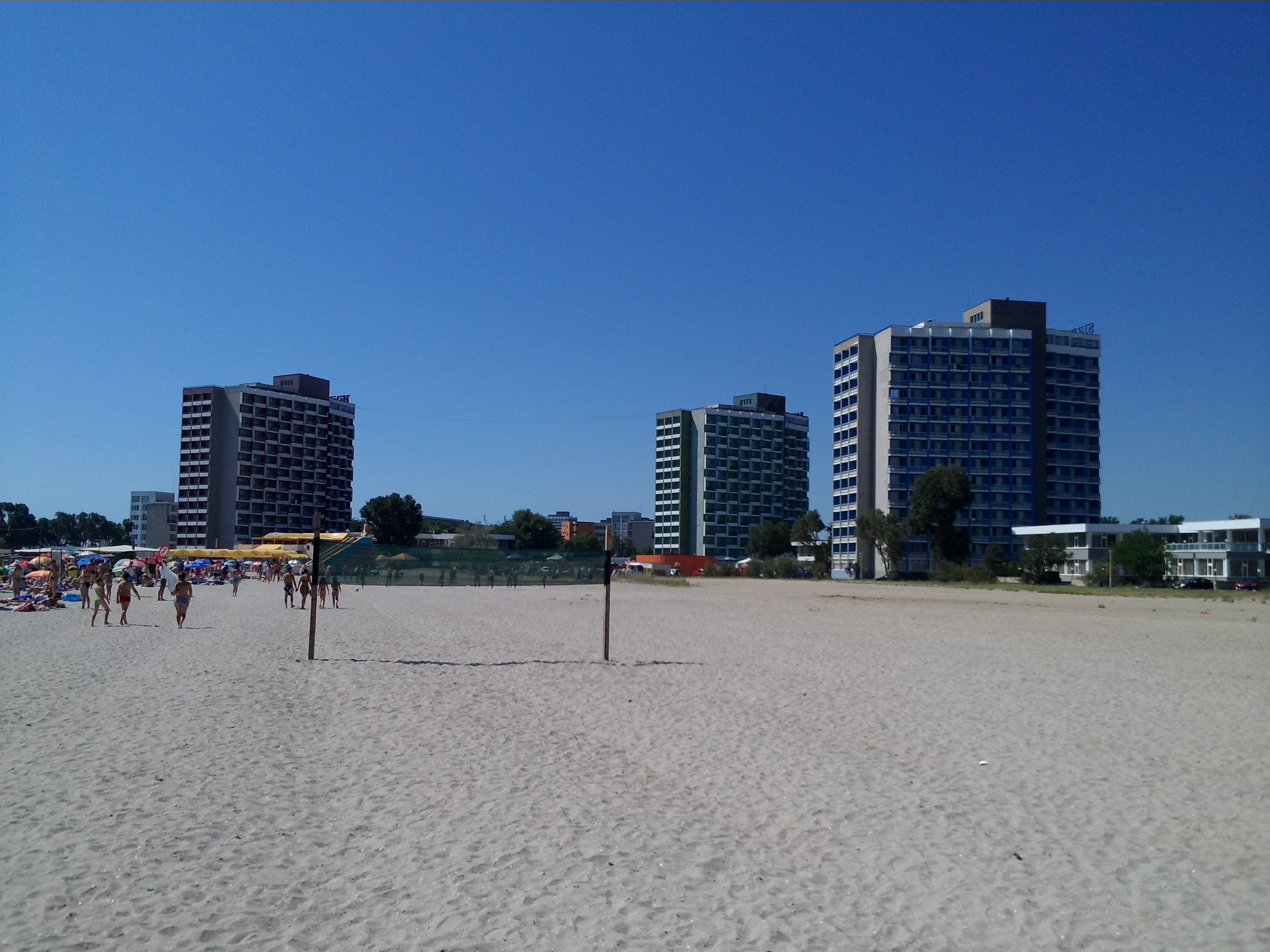 Сатурн, Румунія.